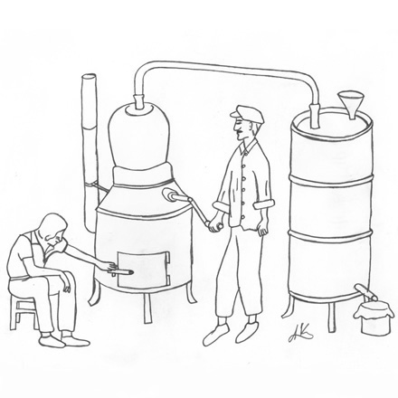 Destilacija rakije